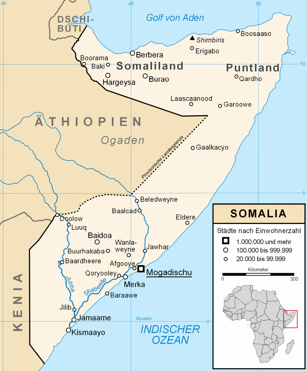 Karte Somalia mit Städten mit mehr als 20.000 Einwohnern